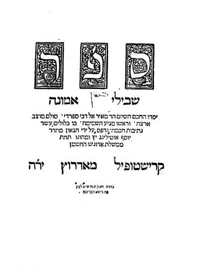 שער ספר דפוס ראשון